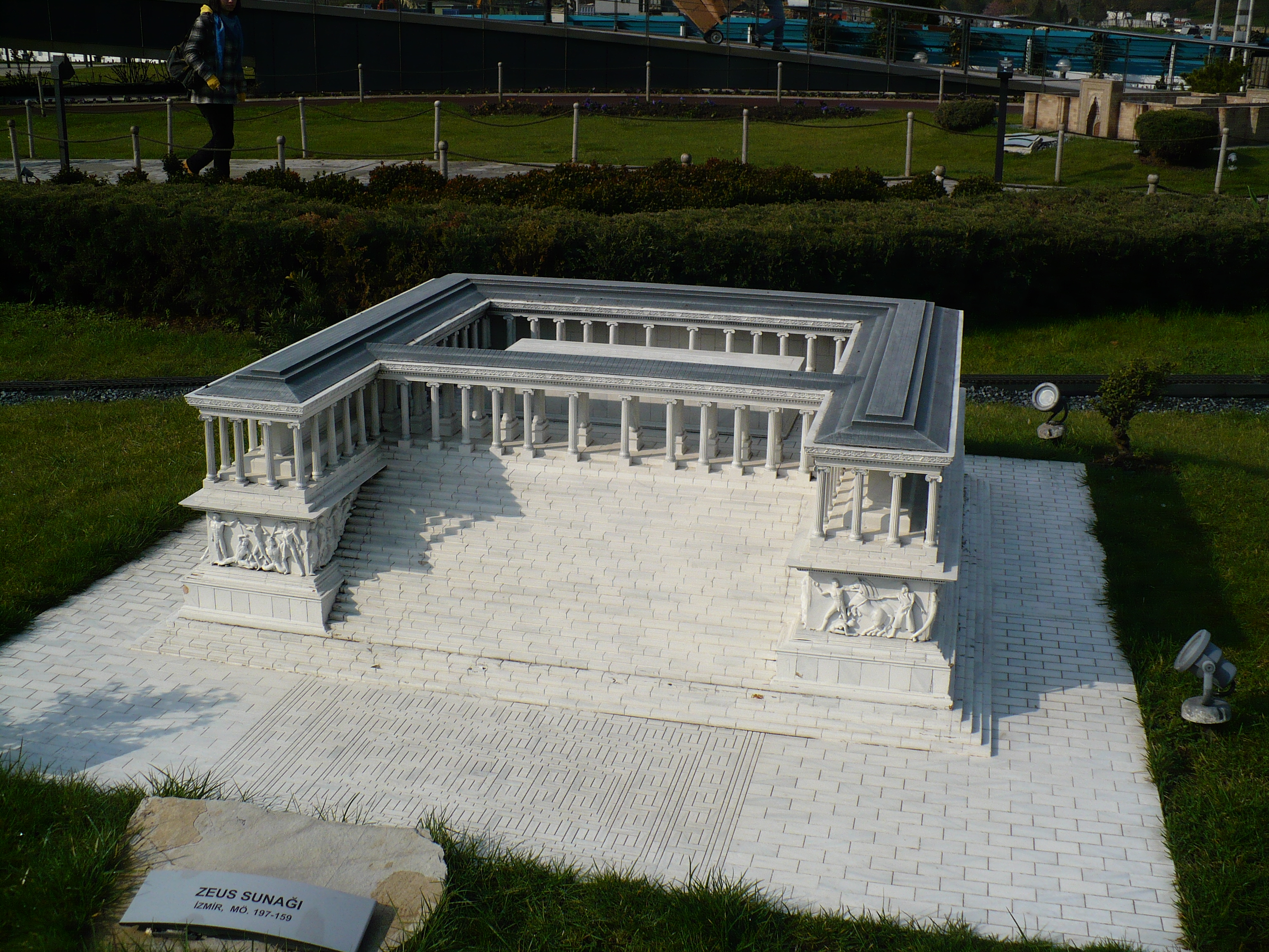 Miniatürk İstanbul'dan görüntüler